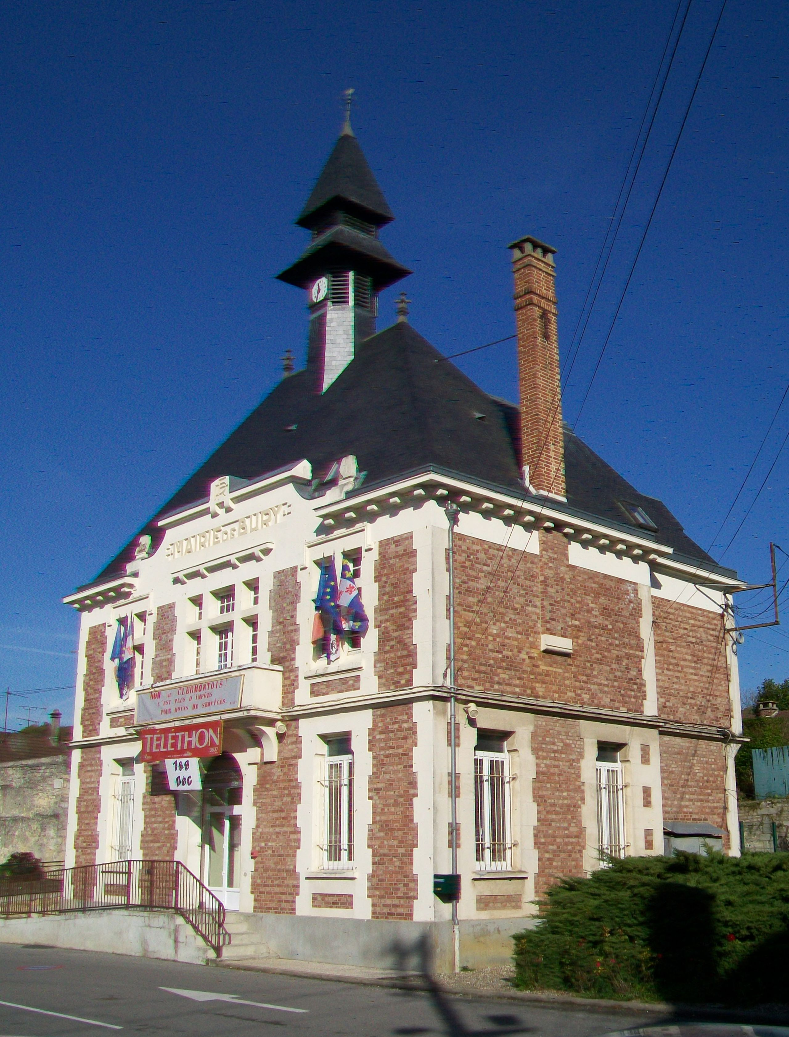 La mairie de Bury (Oise).